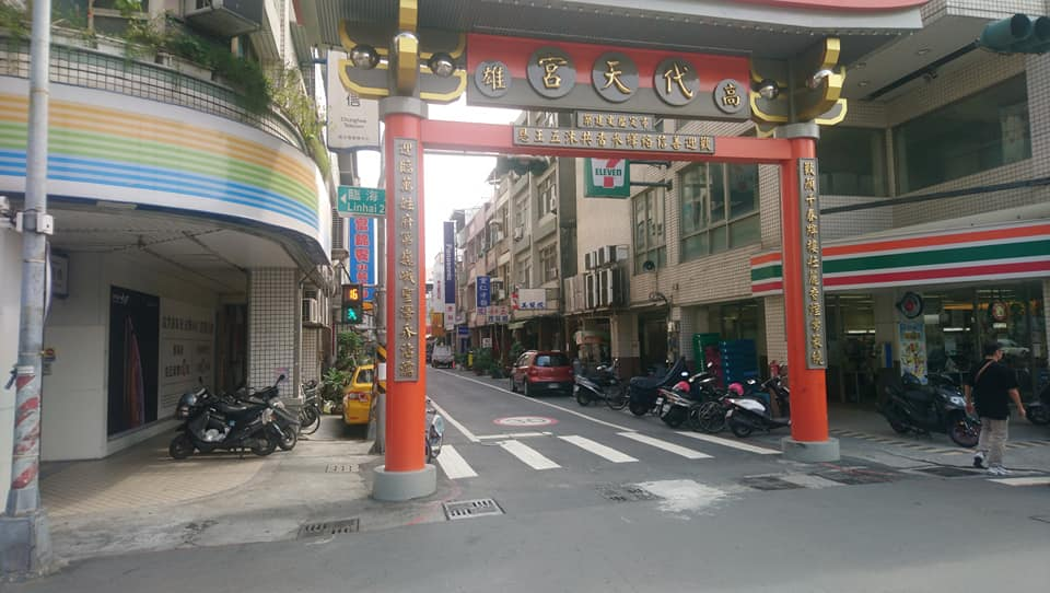 中文（台灣）: 2019-05-31 臨海二路